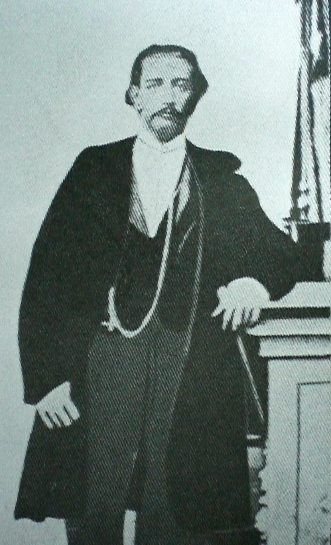 General Manuel Ezequiel Bruzual (1830-1868), jefe federal y presidente interino de Venezuela.